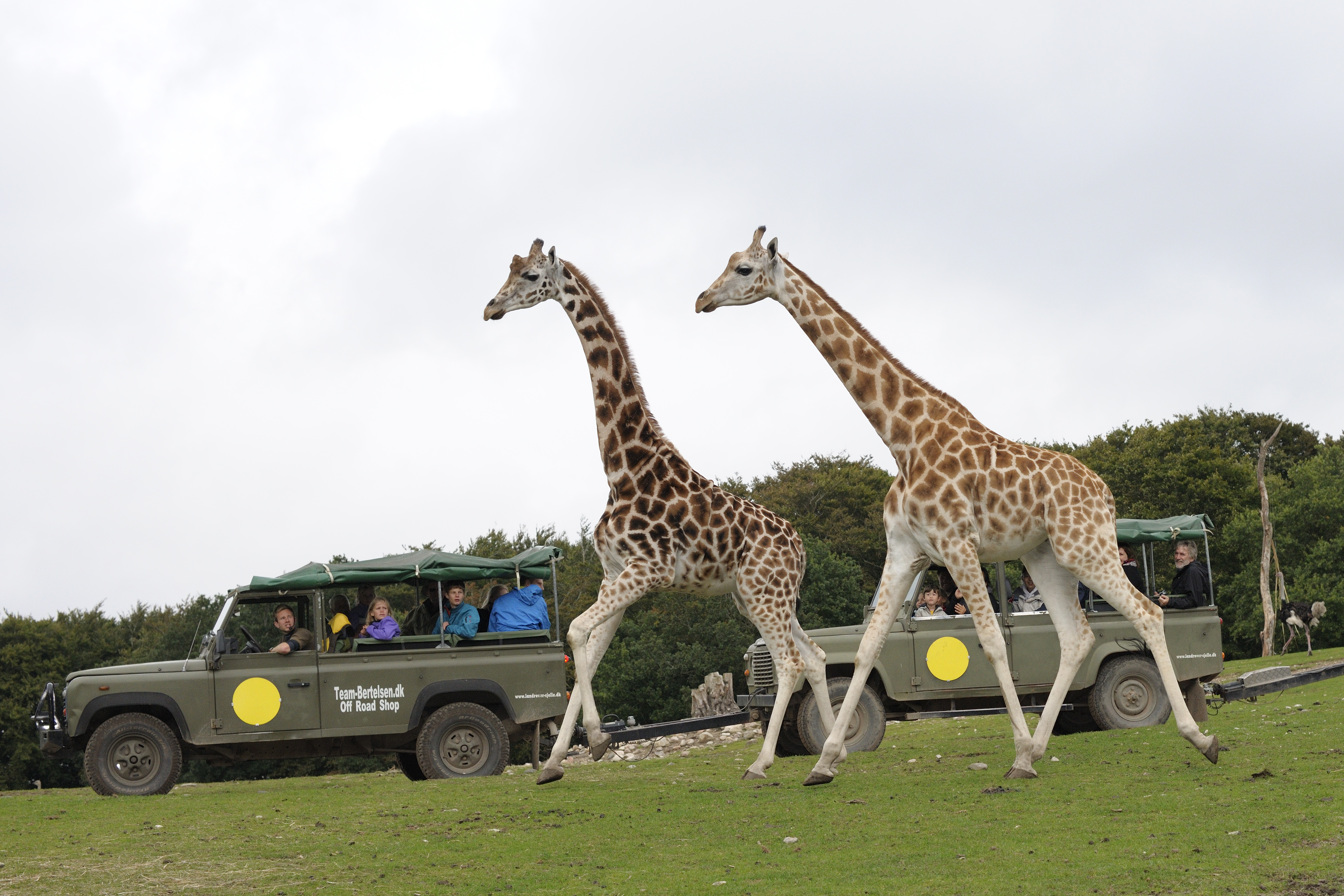 Giraffer i Ree Park